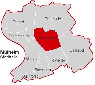 Lagekarte Höhenhaus im Stadtbezirk Köln-Mülheim